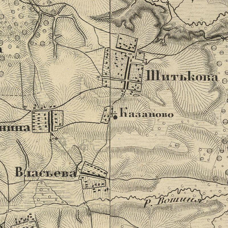 Деревня Шитьково Волоколамского района Московской области России на карте Ф. Ф. Шуберта Московской губернии